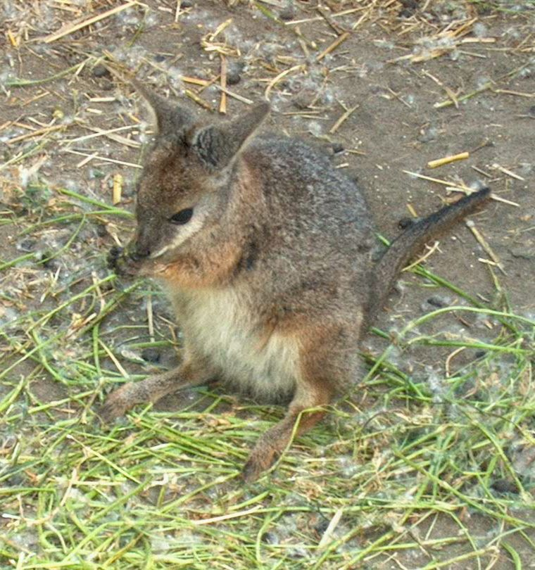 Macropus eugenii in Budapest Zoo